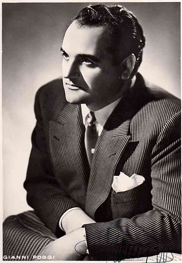 Gianni Poggi cantante lirico cartolina autografata